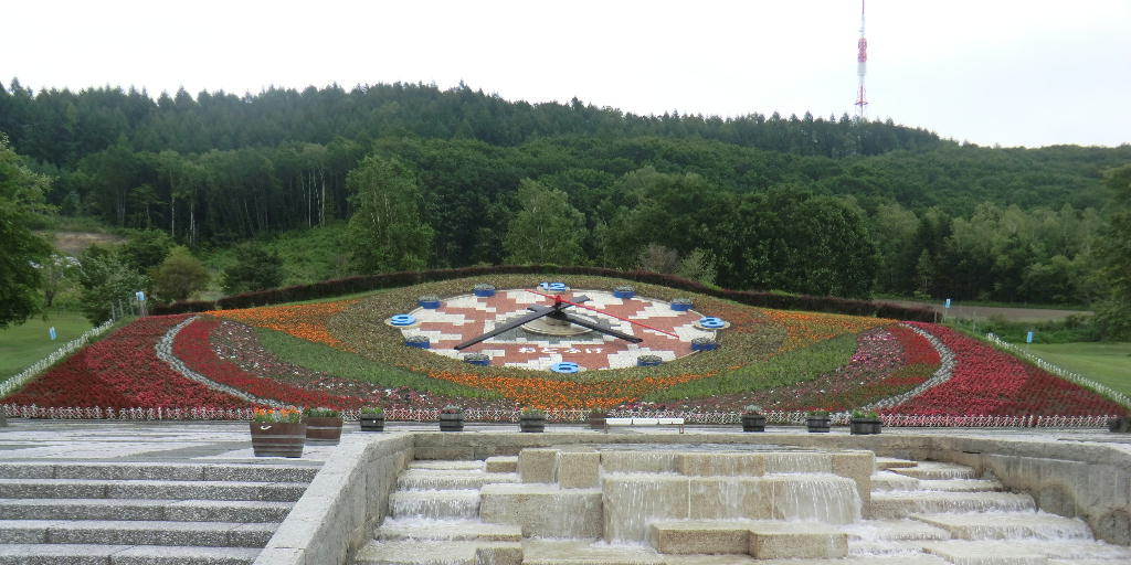 北海道音更町の十勝が丘公園にある花時計「ハナック」です。時計盤の直径はおよそ18mあります。